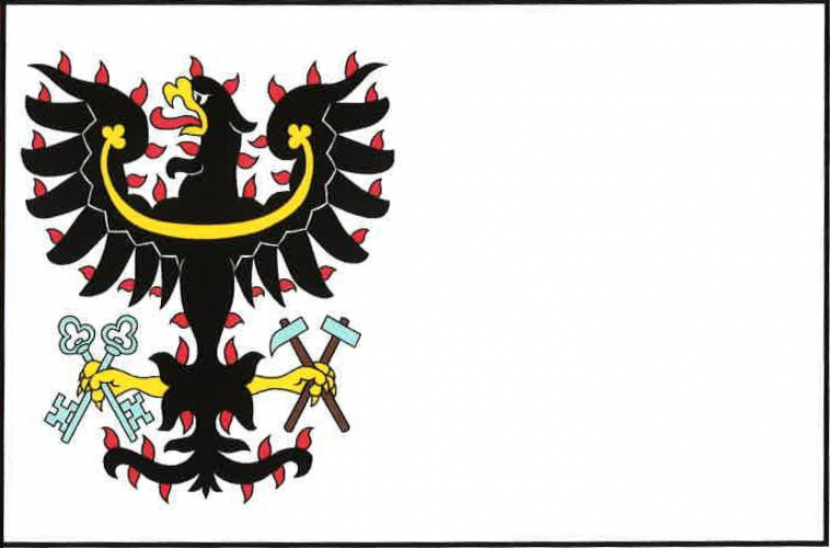 vlajka, Petrovice I, okres Kutná Hora